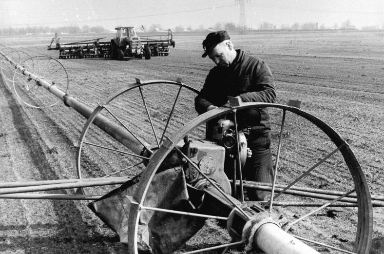 Sülstorf, Aufbau einer Beregnungsanlage ADN-ZB Pätzold-31.3.87-kb Bez. Schwerin: Frühjahrsbestellung. Die Genossenschaftsbauern der LPG (P) Sülstorf im Schweriner Landkreis haben auf ihren leichten Standorten mit der Frühjahrsbestellung begonnen. Neben dem Drillen der Saaten bereitet das Kollektiv - zu ihm gehört Heino Schneider - die Beregnungsanlagen für 1700 Hektar Nutzfläche vor.